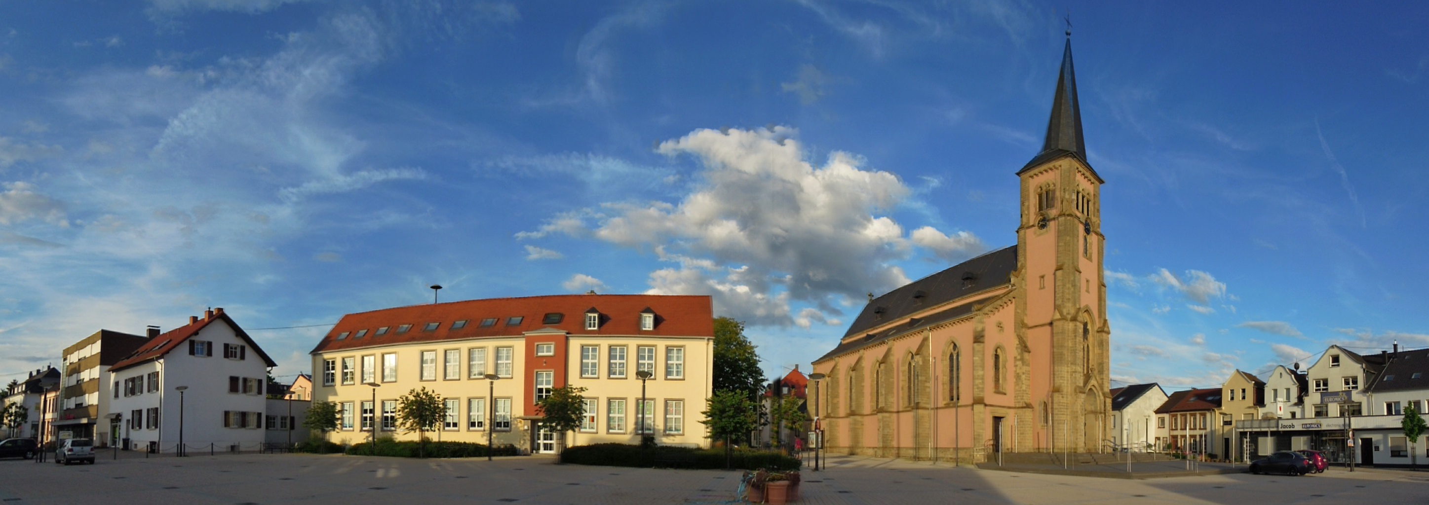 Marktplatz Pachten